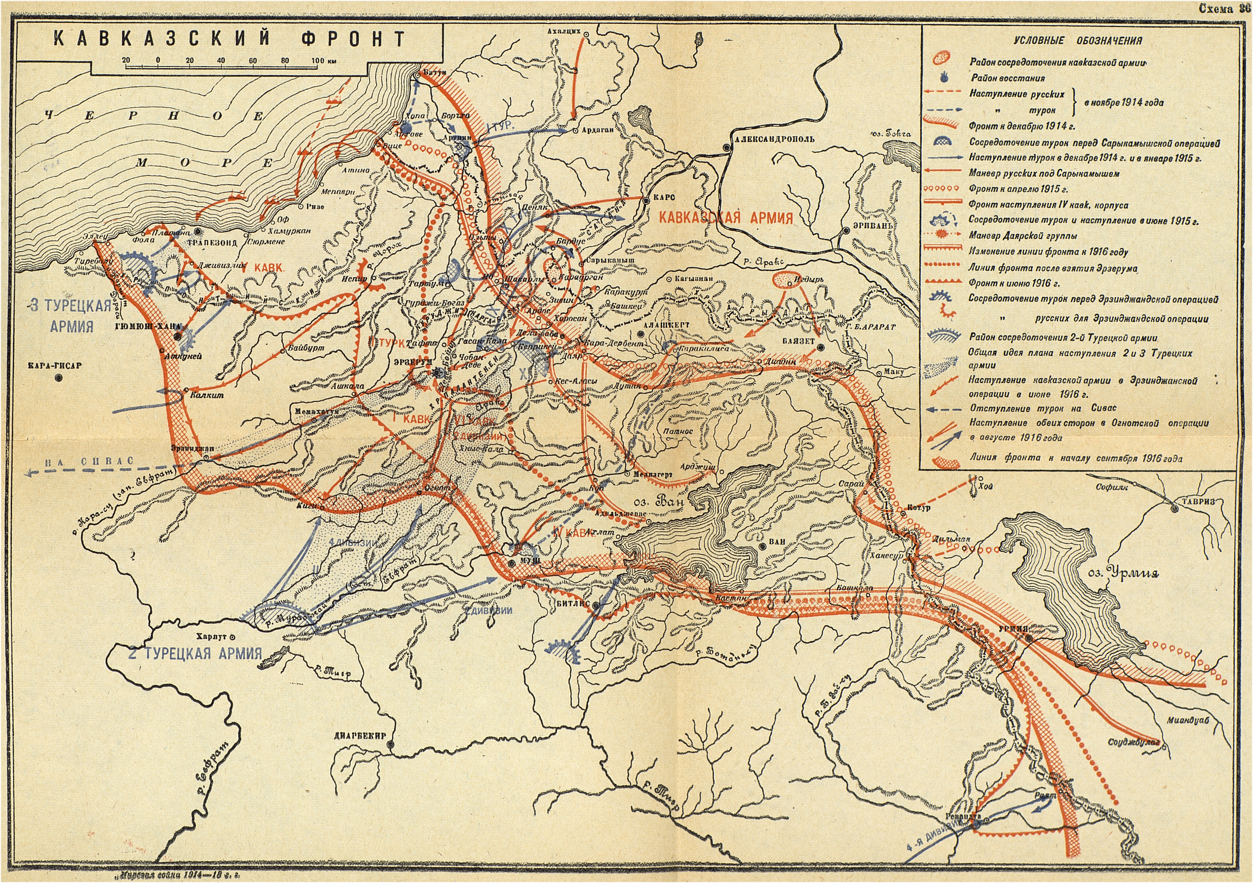 Лист №36. Азиатско-Турецкий театр. Кавказский фронт.